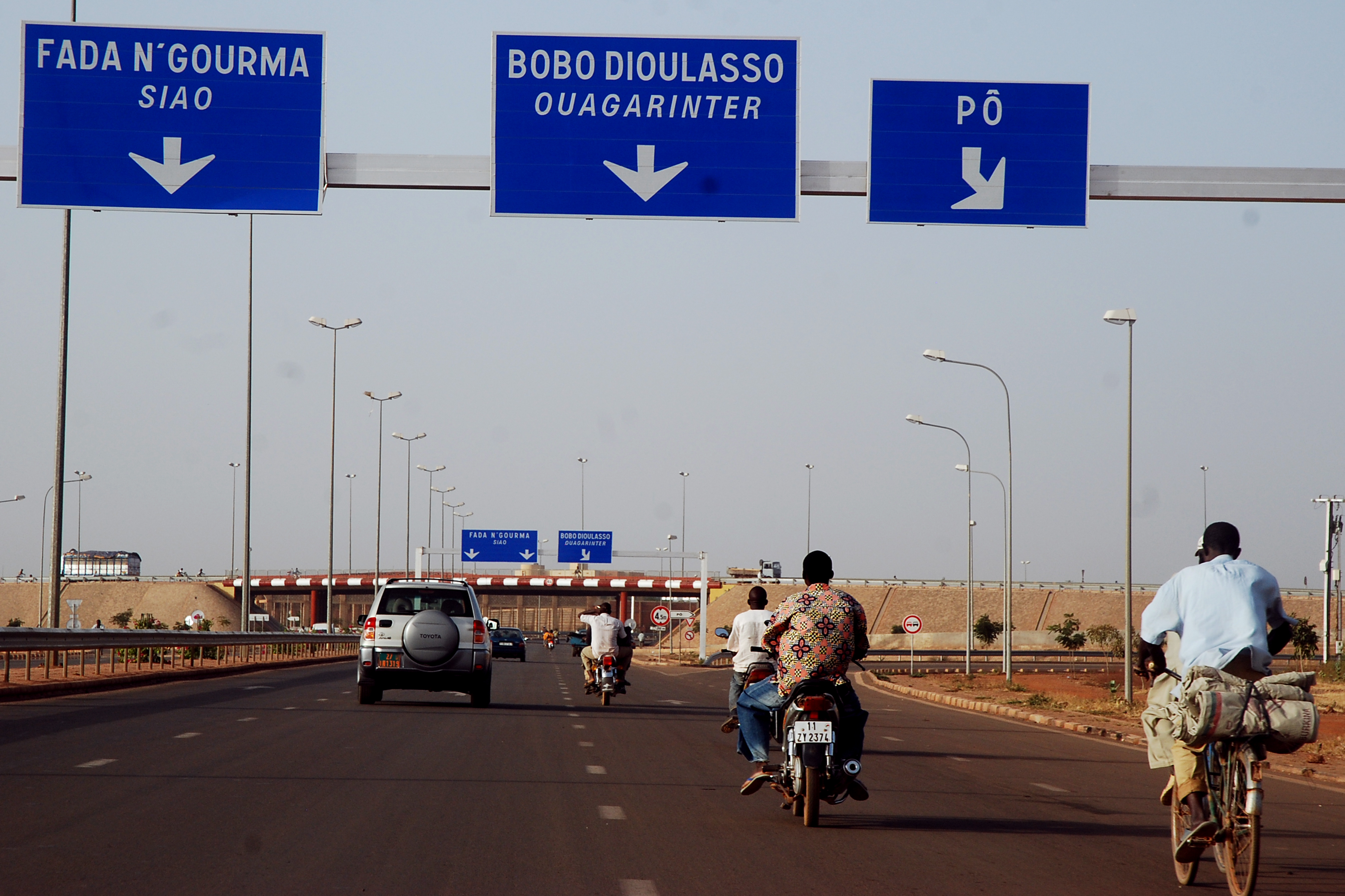 Circulation dans une rue de Ouagadougou au Burkina Faso. This is an image with the theme "Africa on the Move or Transport" from: Burkina Faso